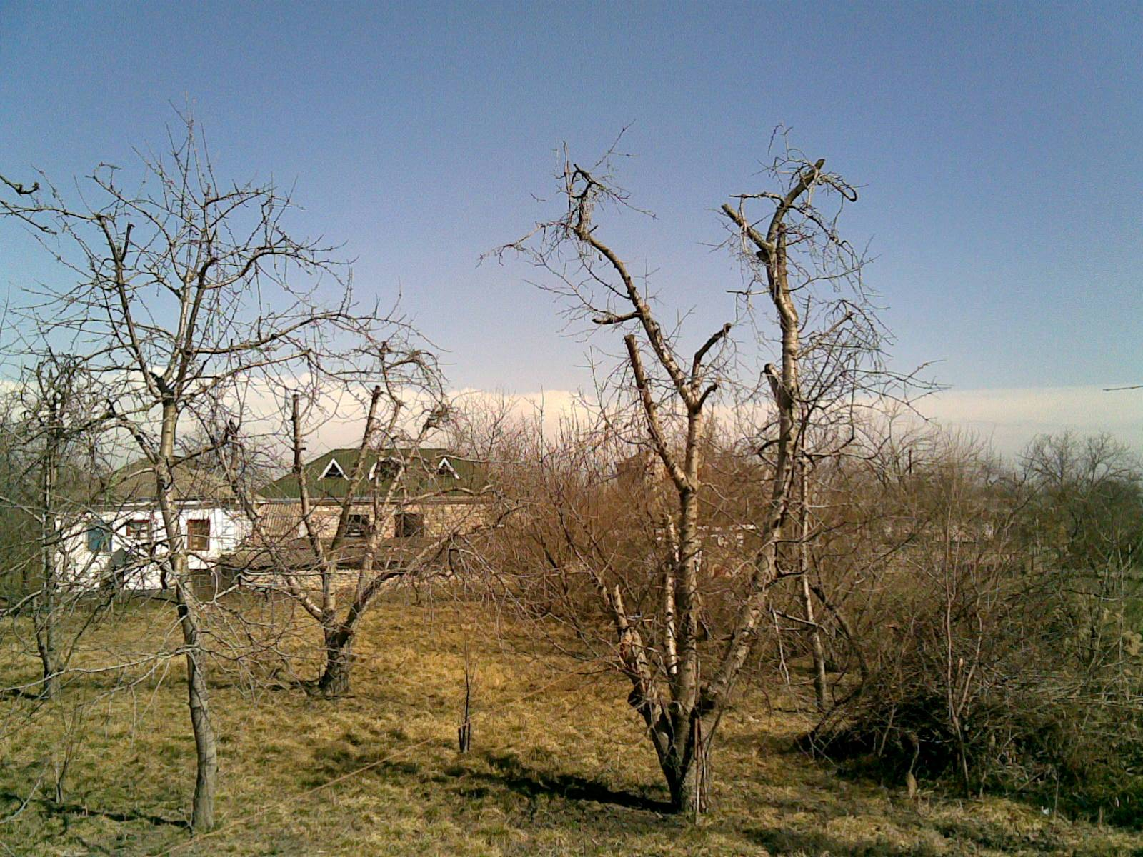 Suxtaqalaqışlaq